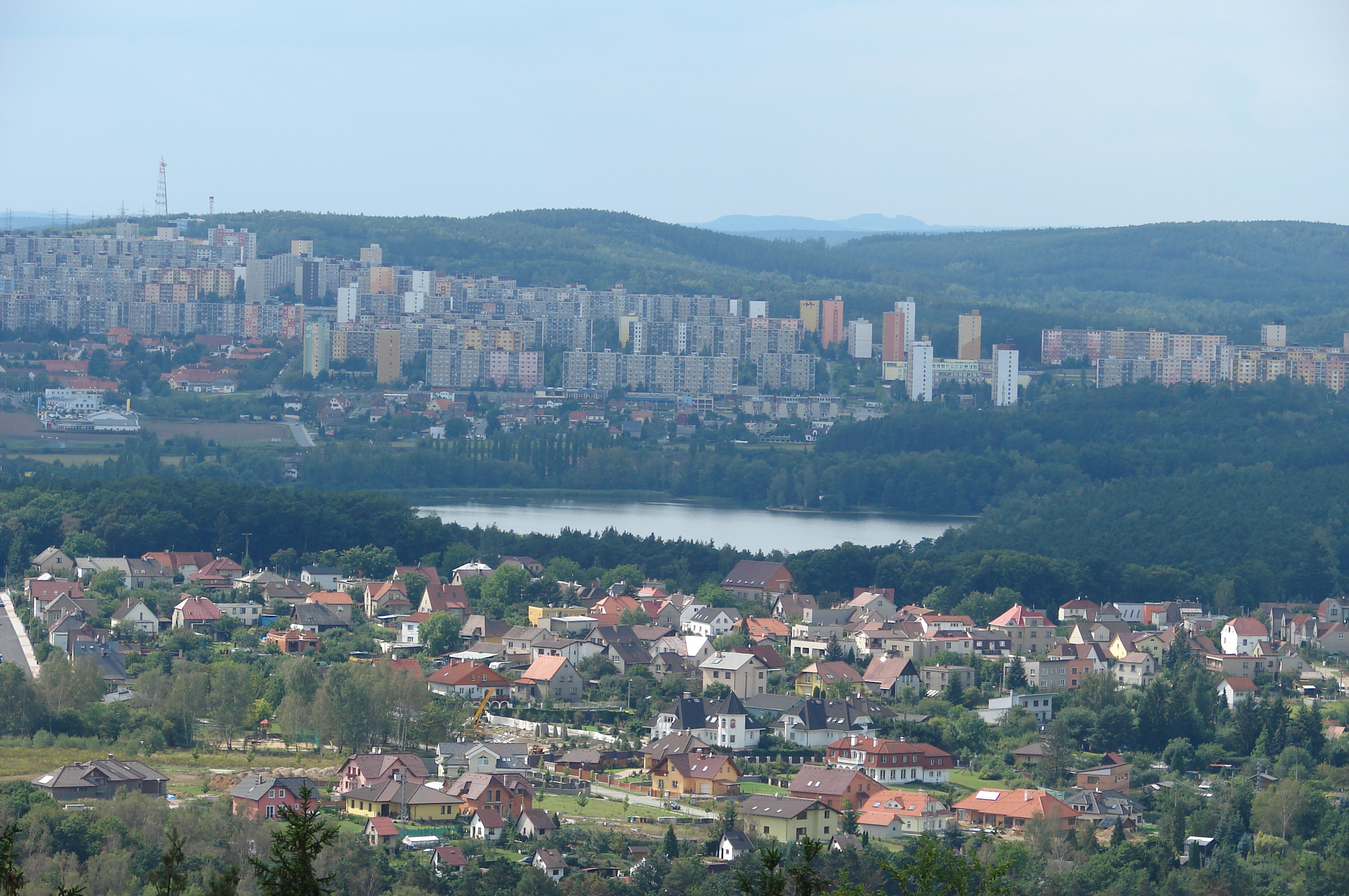 Bílá Hora + Bolevec